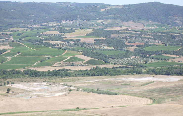 Panorama a nord di Montenero d'Orcia (GR), Tuscany (Italy)